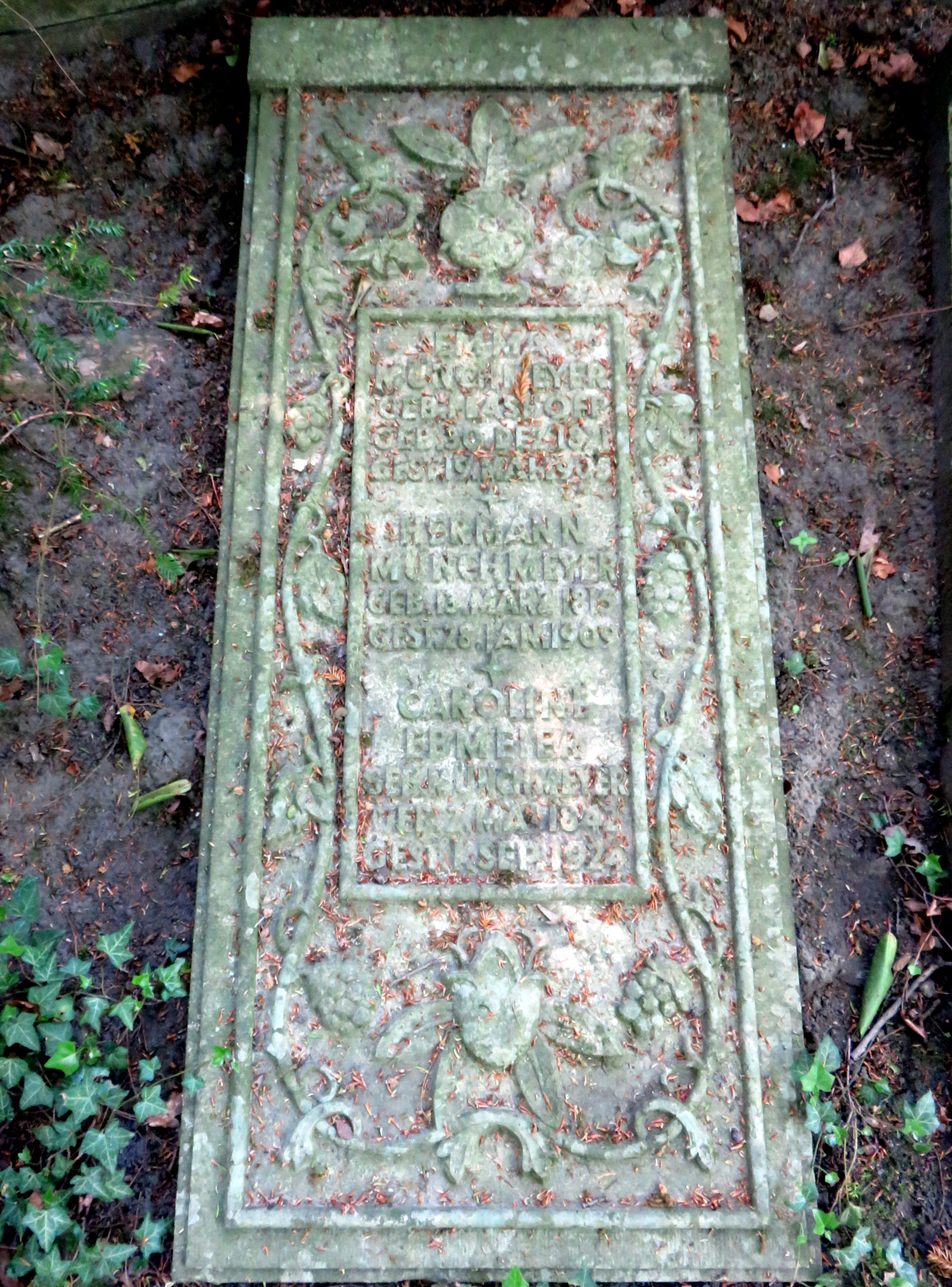 Grabplatte für den deutschen Kaufmann Hermann Münchmeyer im Bereich der rondeelartigen Familiengrabanlage auf dem Ohlsdorfer Friedhof in Hamburg.